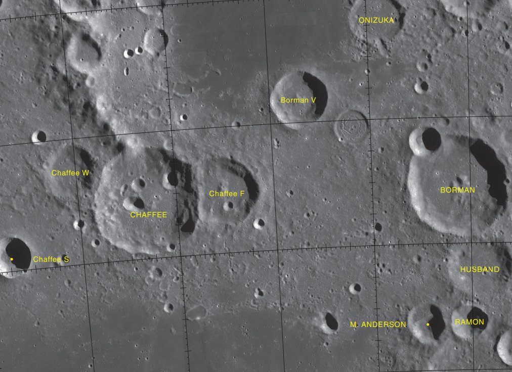 Cráter Chaffee (LROC)